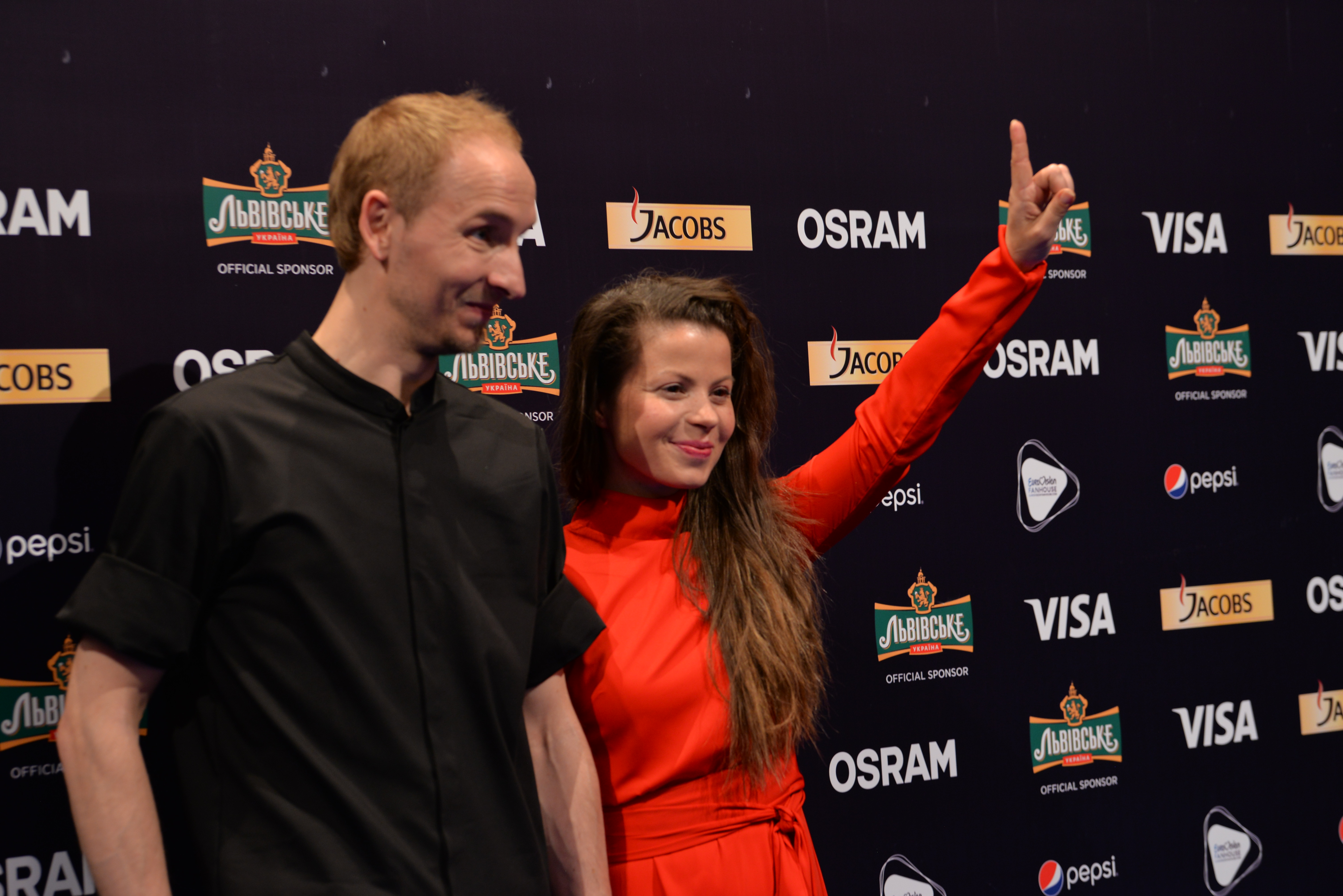 Fusedmarc, Lithuanian electronic band from Vilnius in Kyiv